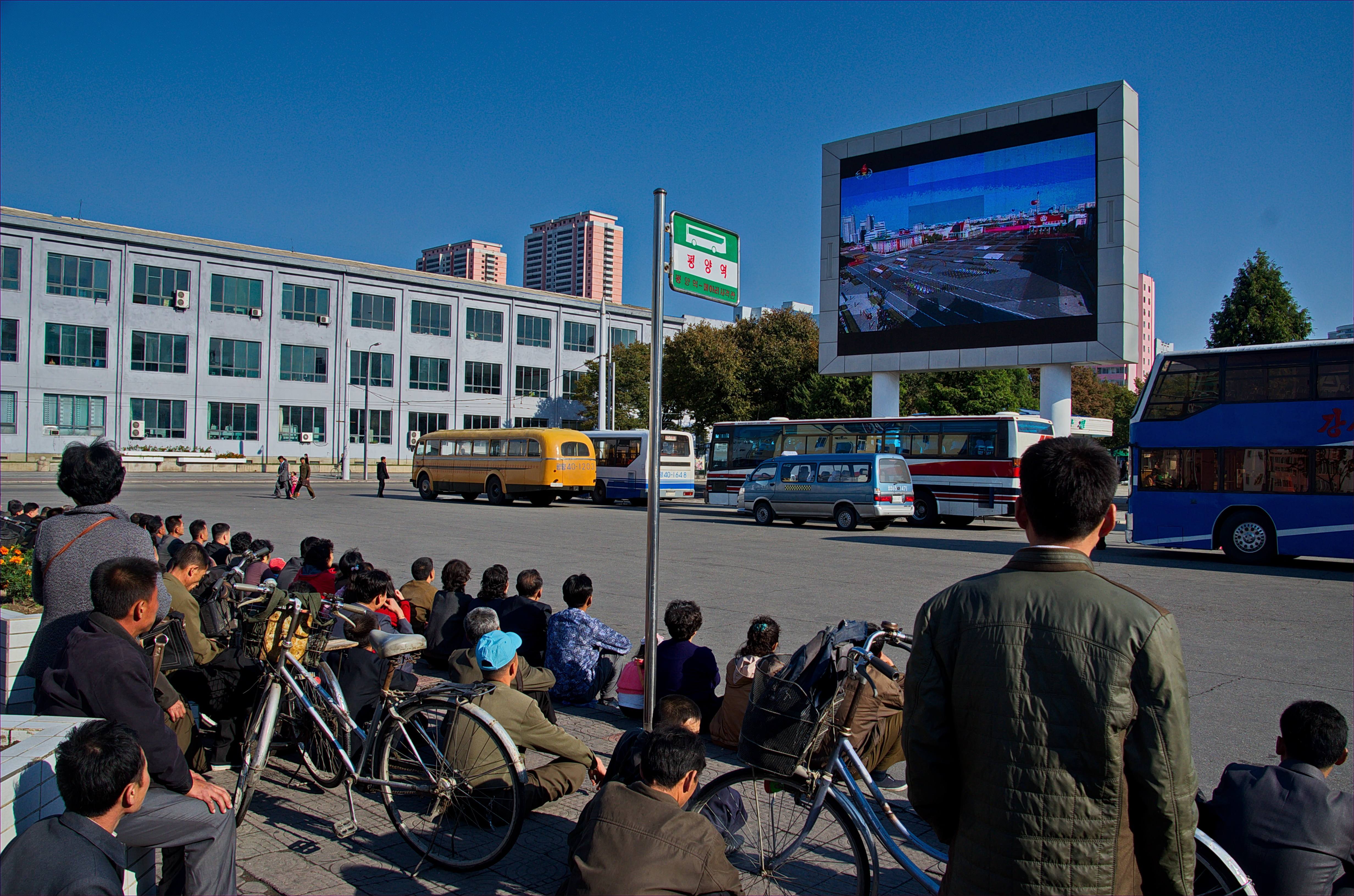 Nordkorea 2015 - Pjöngjang - Public Viewing am Bahnhofsplatz